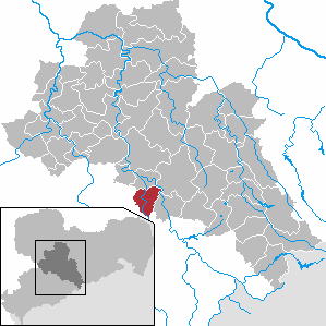 Augustusburg in Saxony - district Mittelsachsen